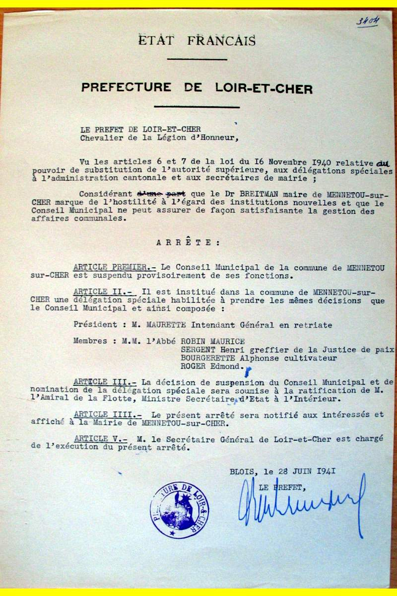 Arrêté préfectoral du 28-06-1941 relevant le Dr Breitman de sa fonction de maire de Mennetou-sur-Cher